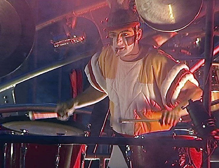 Internationale Kulturtage der Stadt Dortmund 2000, Transe Express: „Lâcher de Violons“ (Straßentheater)